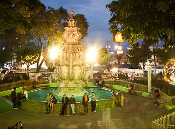 Ciudad de Chimaltenango